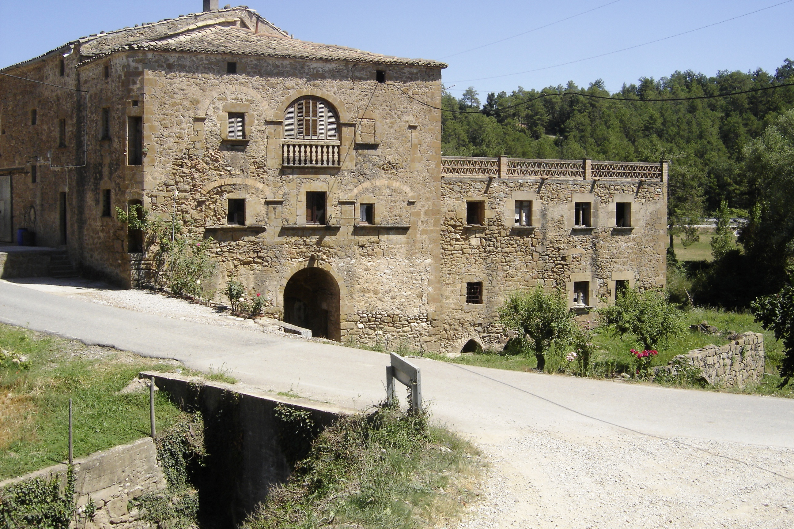 El Molí de Querol (Castellar de la Ribera) (Solsonès). Per sota el pont de la part inferior esquerra hi passa el barranc de Querol.